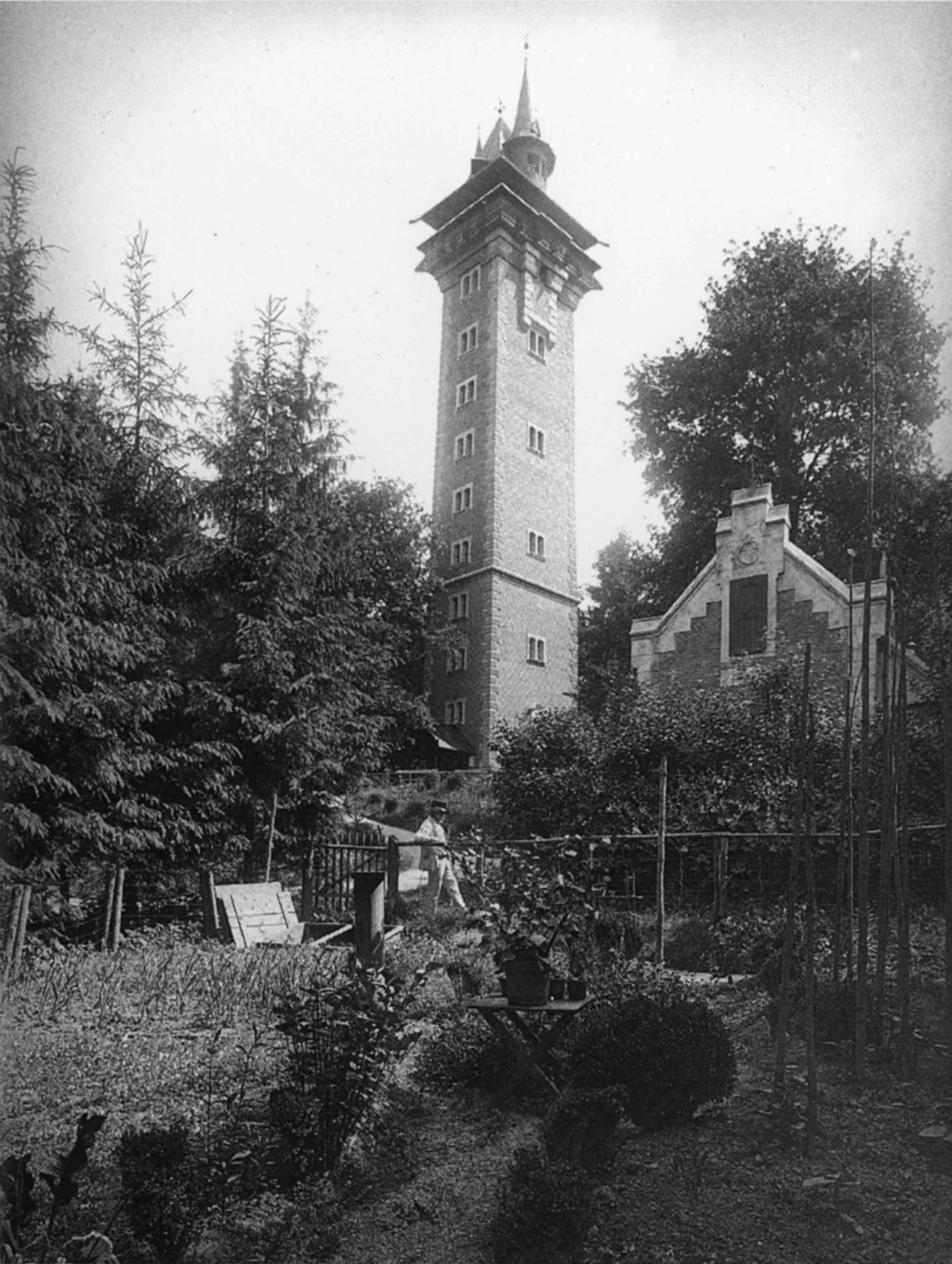 Die Hilmwarte mit der alten Aussichtsplattform und das Turmwärterhaus Scanprojekt Community Projektbudget 2012 This scan or this PDF-file was created within the GLAM-project Bookscanning, supported by Wikimedia Germany and Wikimedia Austria as a part of the community-project to capture books, documents and pictures which are not eligible to copyright or for which the copyright has expired. This document describes or depicts an object which is located in Austria today. Texts are written German language. Send requests for uncompressed scans to Hubertl. This work is in the public domain in its country of origin and other countries and areas where the copyright term is the author's life plus 100 years or fewer. You must also include a United States public domain tag to indicate why this work is in the public domain in the United States. This file has been identified as being free of known restrictions under copyright law, including all related and neighboring rights.